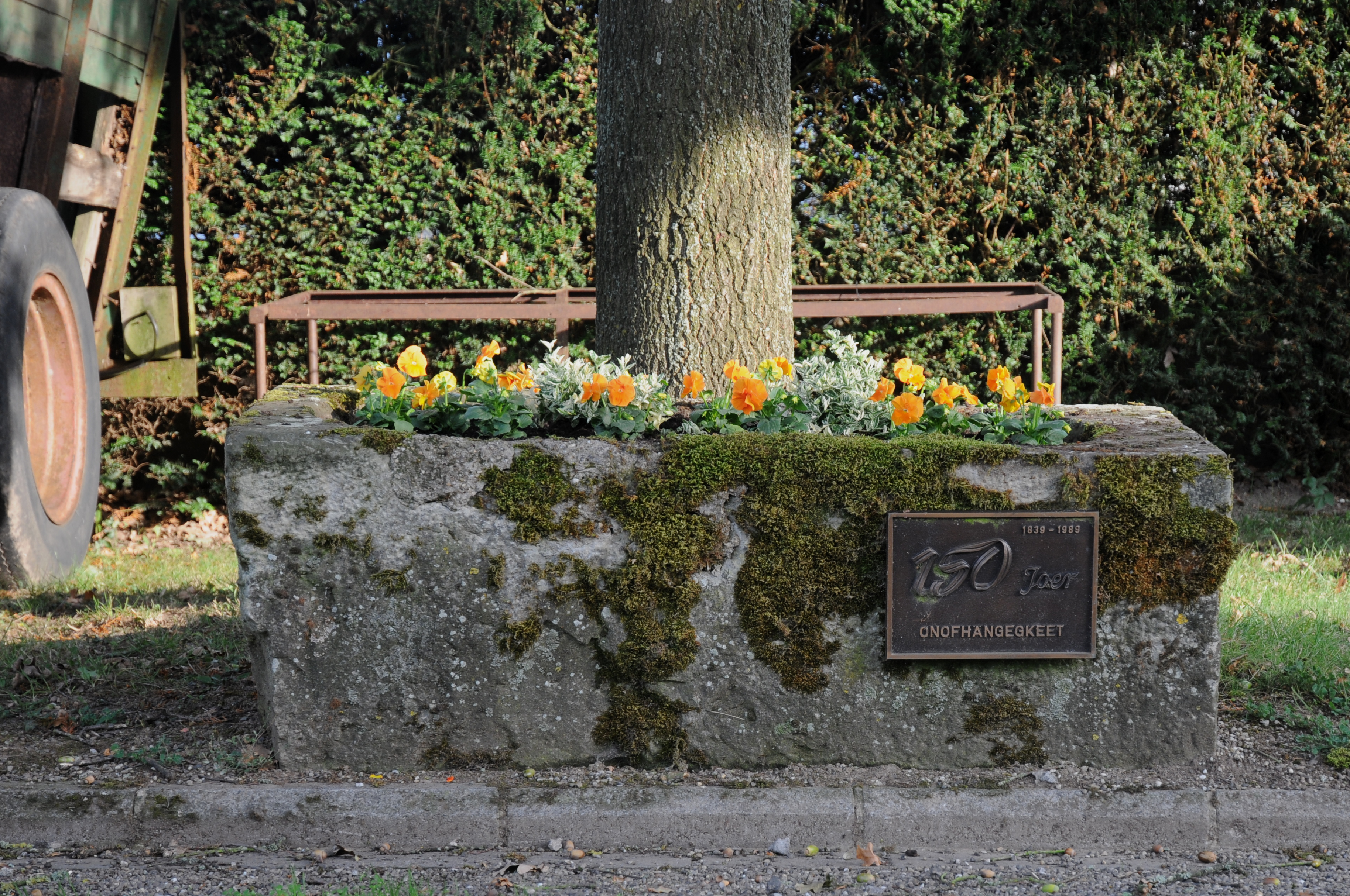 1839-1989, 150 Joer Onofhängegkeet zu Bierden.